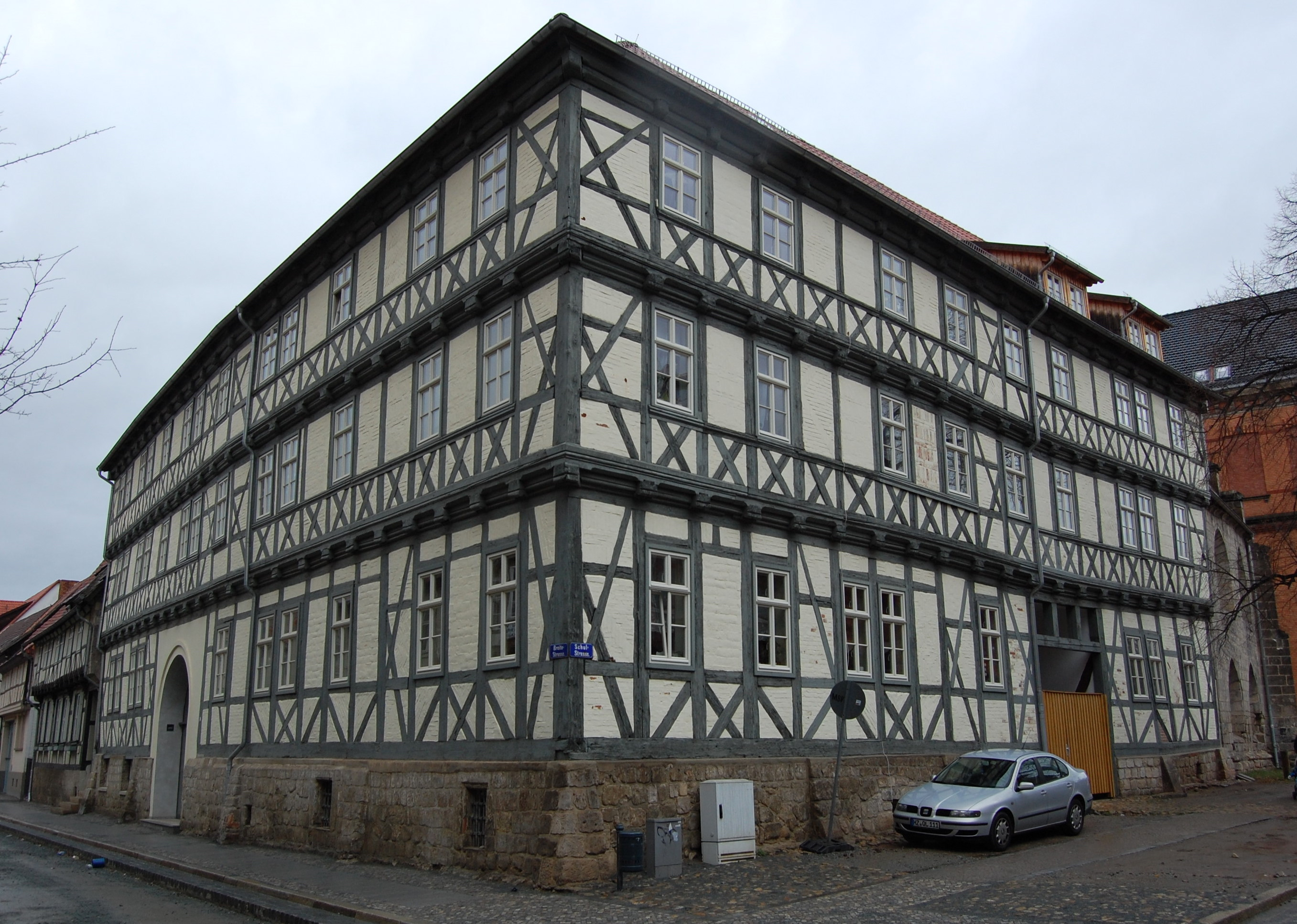 Haus Breite Straße 34 in Quedlinburg, die Hofeinfahrt rechts befindet sich in der Schulstraße